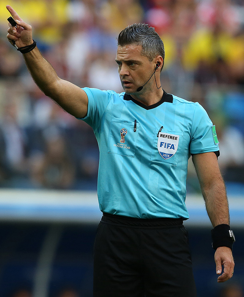 Сборная Швеции зрелищно вышла в четвертьфинал ЧМ-2018